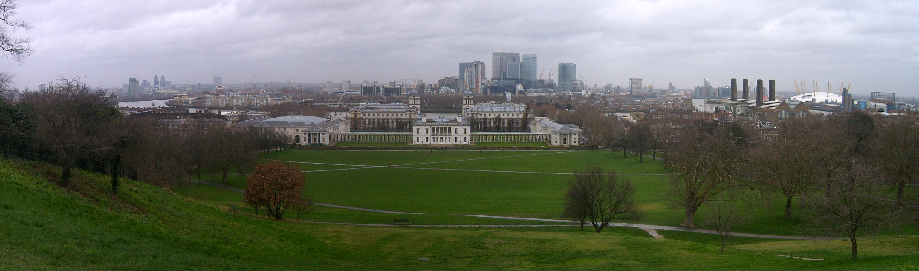 Greenwich